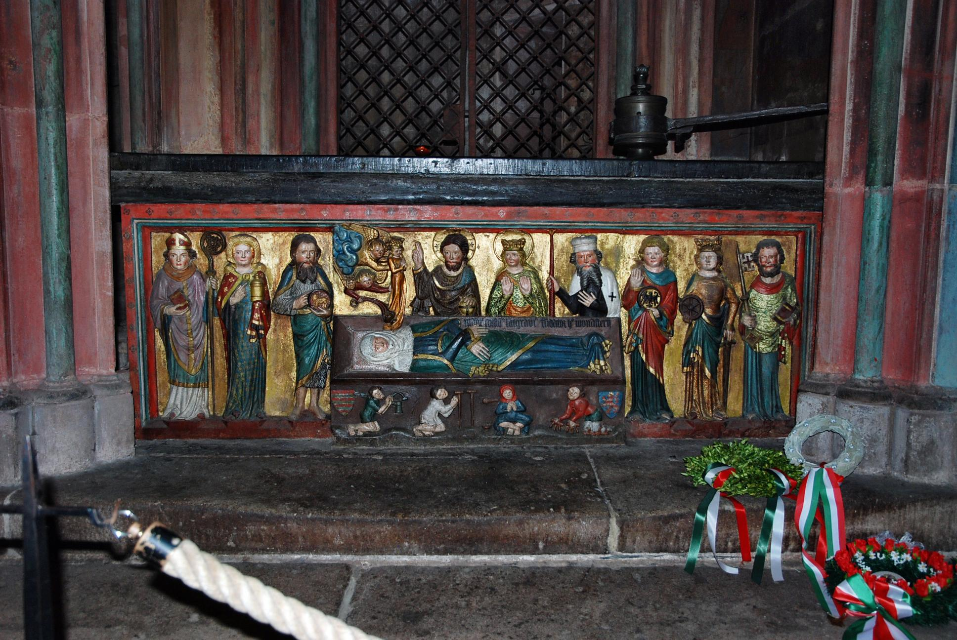 Marburg, Elisabethkirche, Grabmal der Heiligen Elisabeth